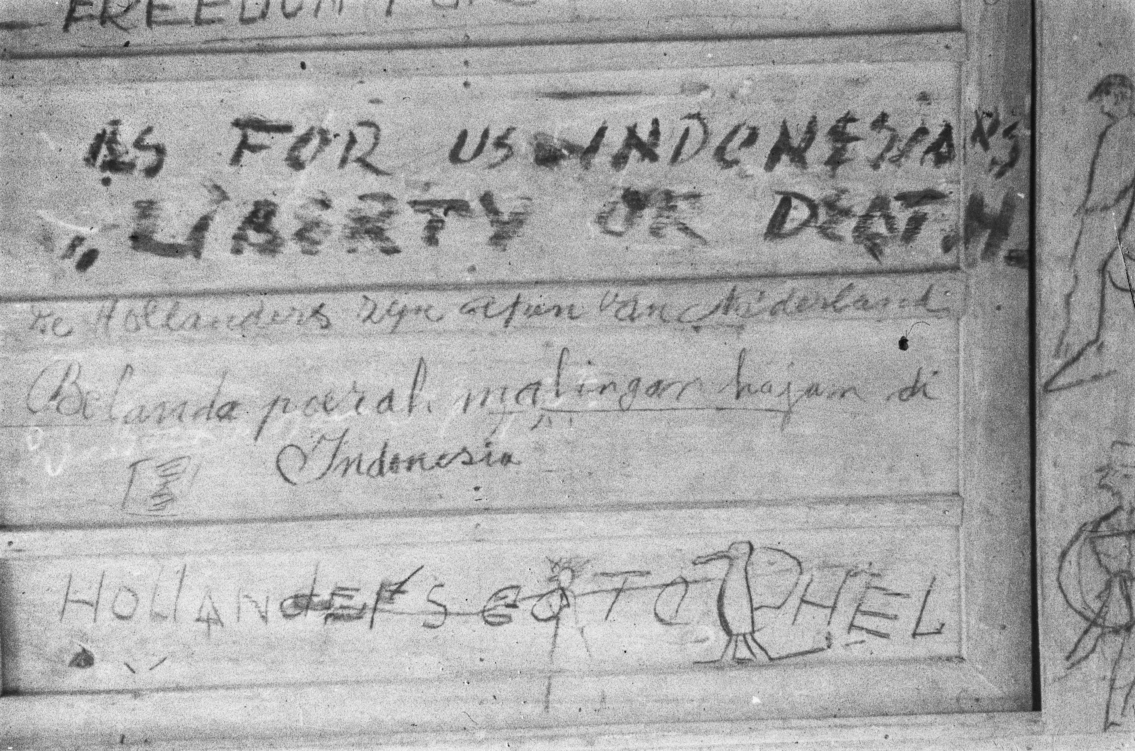 Collectie / Archief : Fotocollectie Dienst voor Legercontacten Indonesië Reportage / Serie : [DLC] Soemedang Beschrijving : Grafitti "Freedom. Is for us Indenesians "Liberty or Death". De Hollanders zijn apen van Nederland. Belandah poerah malingan kajam di Indonesia. Hollanders go to Hel Datum : 14 januari 1948 Locatie : Indonesië, Java, Nederlands-Indië Fotograaf : Wakker, H. / DLC Auteursrechthebbende : Nationaal Archief Materiaalsoort : Negatief (zwart/wit) Nummer archiefinventaris : bekijk toegang 2.24.04.03 Bestanddeelnummer : 495-4-6